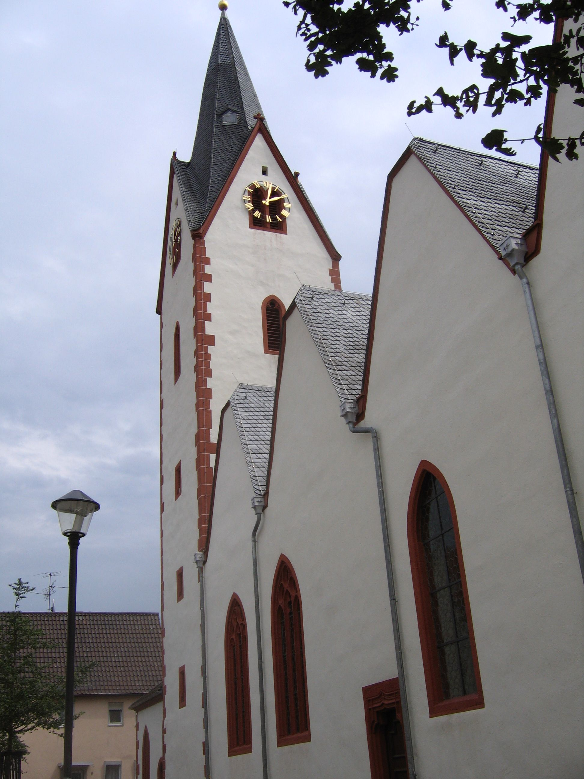 Stadtkirche Babenhausen1